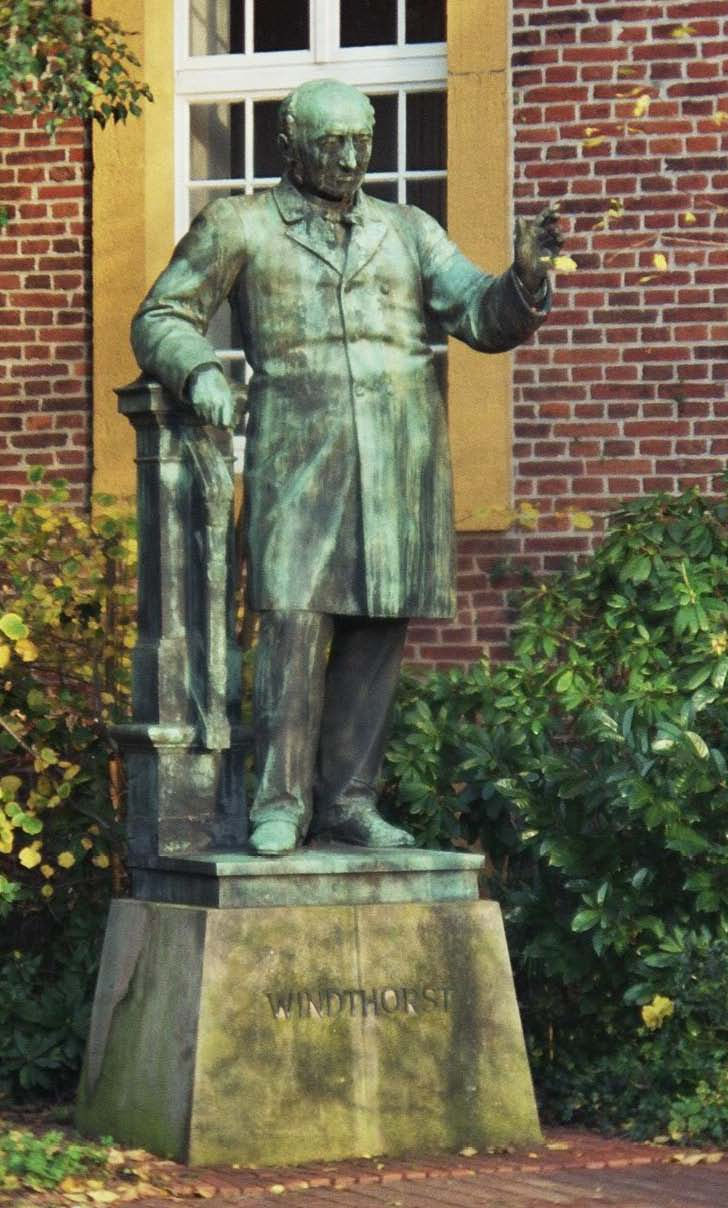 Statue von Ludwig Windthorst vor dem Meppener Windhorst-Gymnasium − Plastiker Heinrich Pohlmann